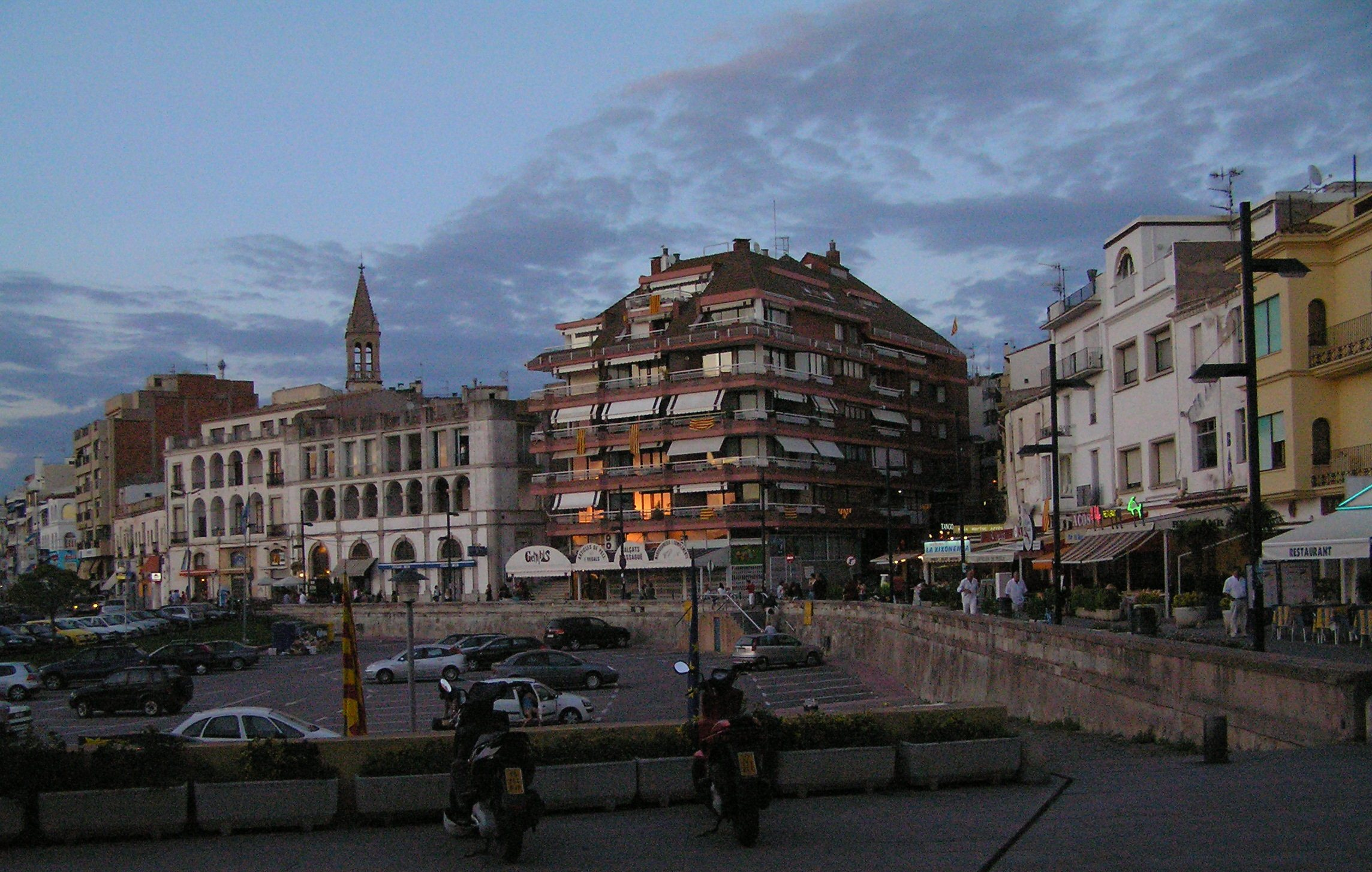 Picture of Palamós from Plaça de Sant Pere